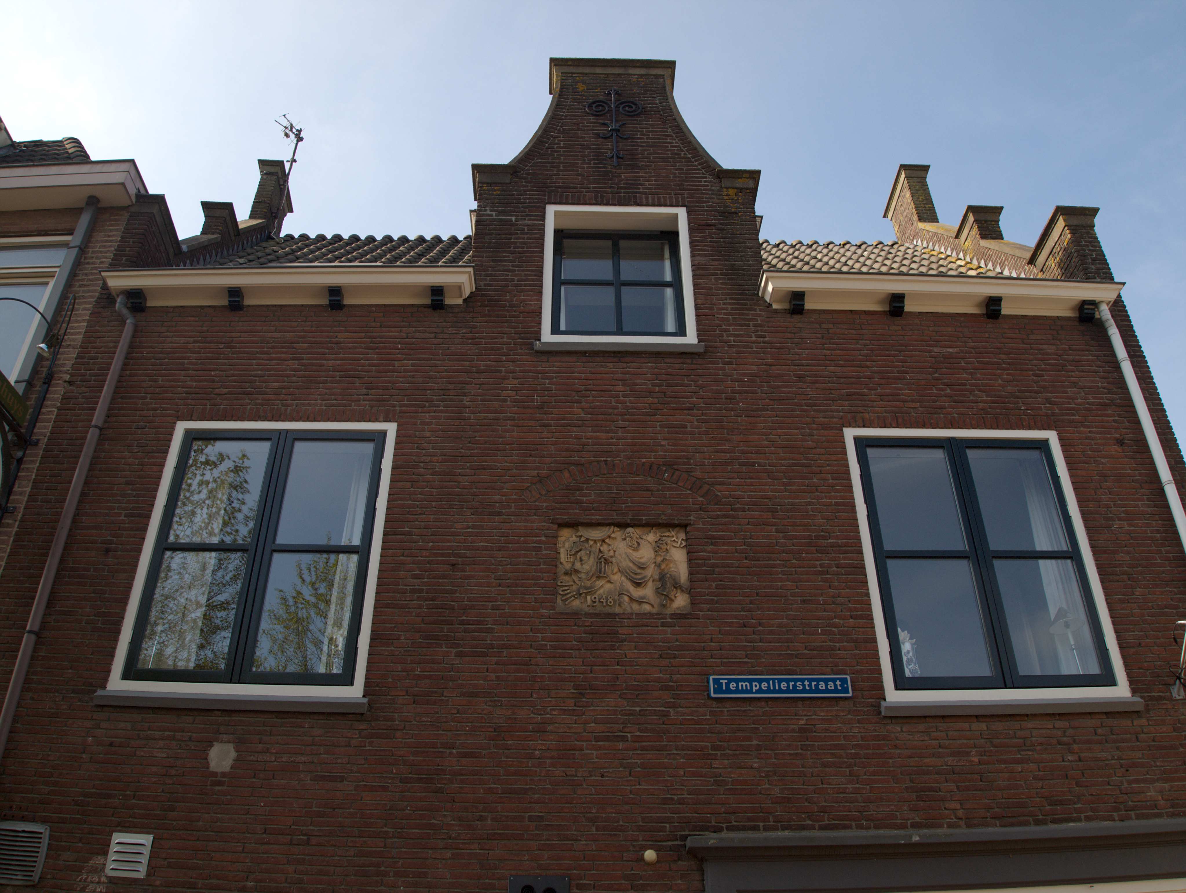 Dit is een compositiesfoto van het oorlogsmonument (reliëf) aan de Tempelierenstraat te Huissen.